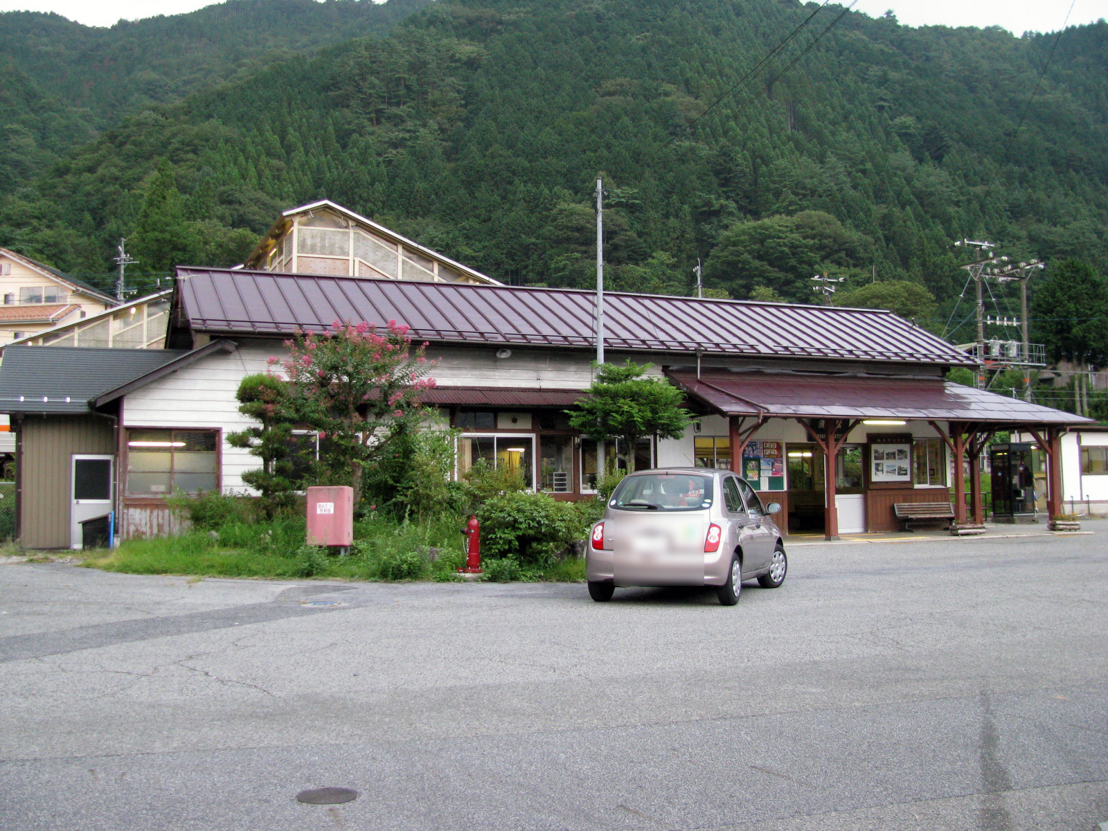 JR中央本線須原駅